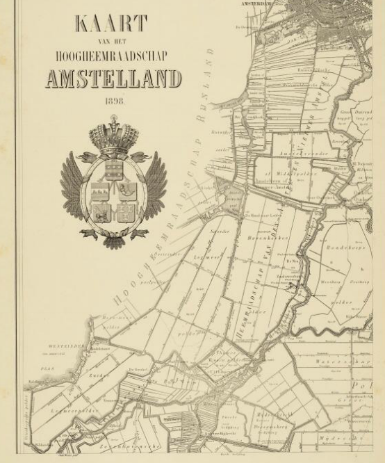 Kaart 1 (linksboven), deel van Kaart_van_Amstelland_(1898)_in_4_delen (AGV Diginummer:010070)